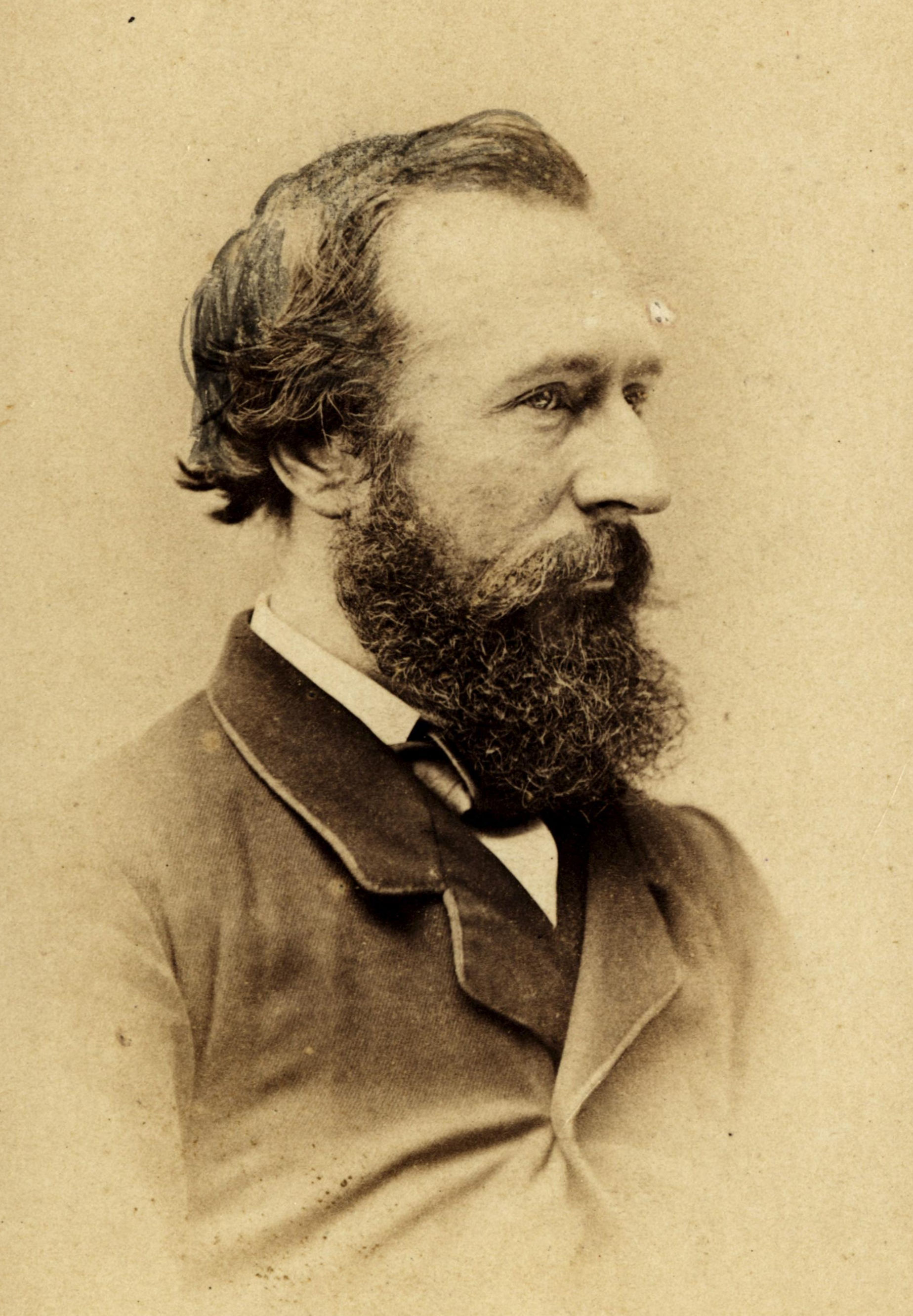 Portretfoto (detail carte de visite) van J.H. Egenberger uit 1868